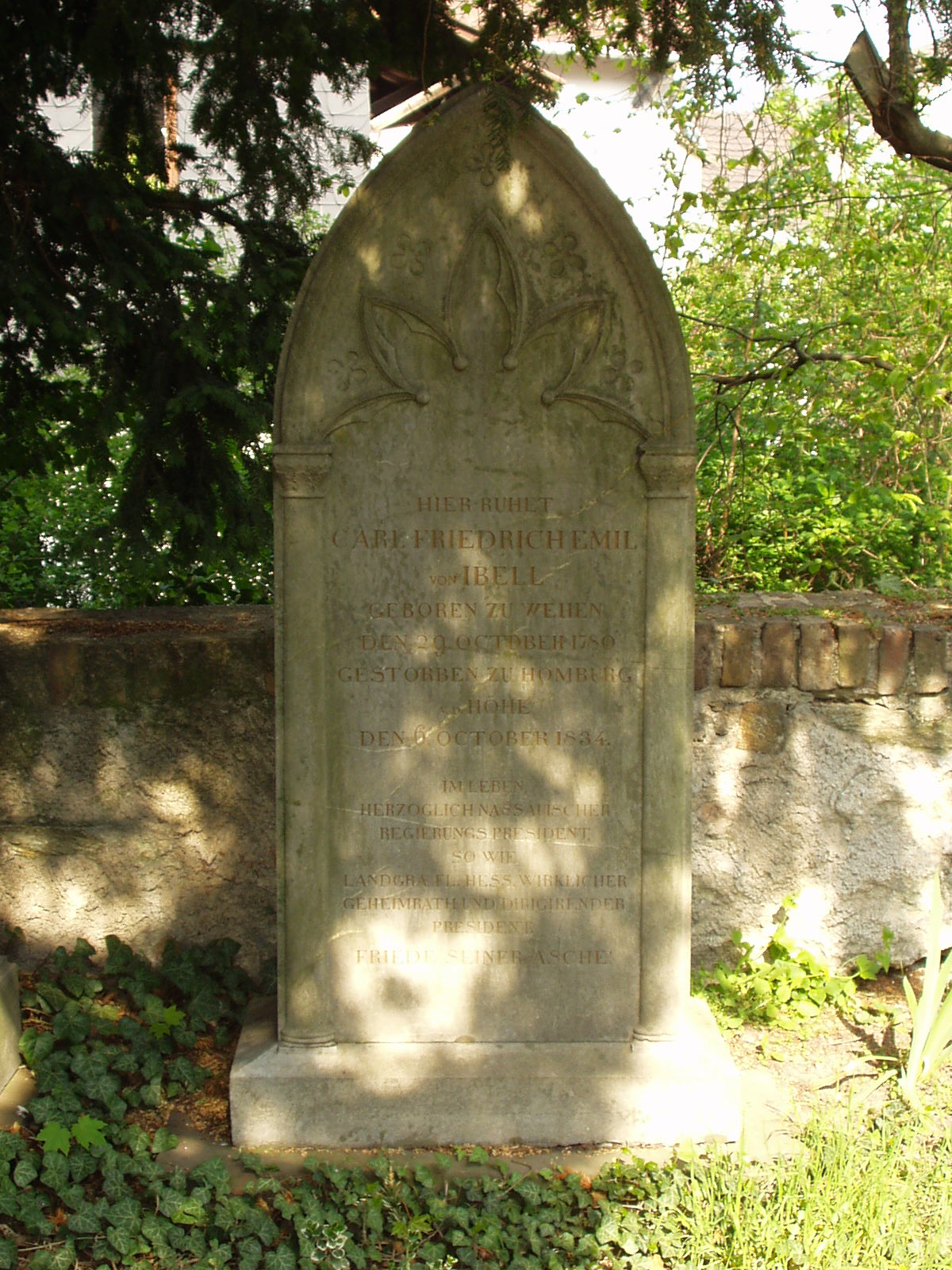 Grabstein von Carl Friedrich Emil von Ibell in Frankfurt-Unterliederbach